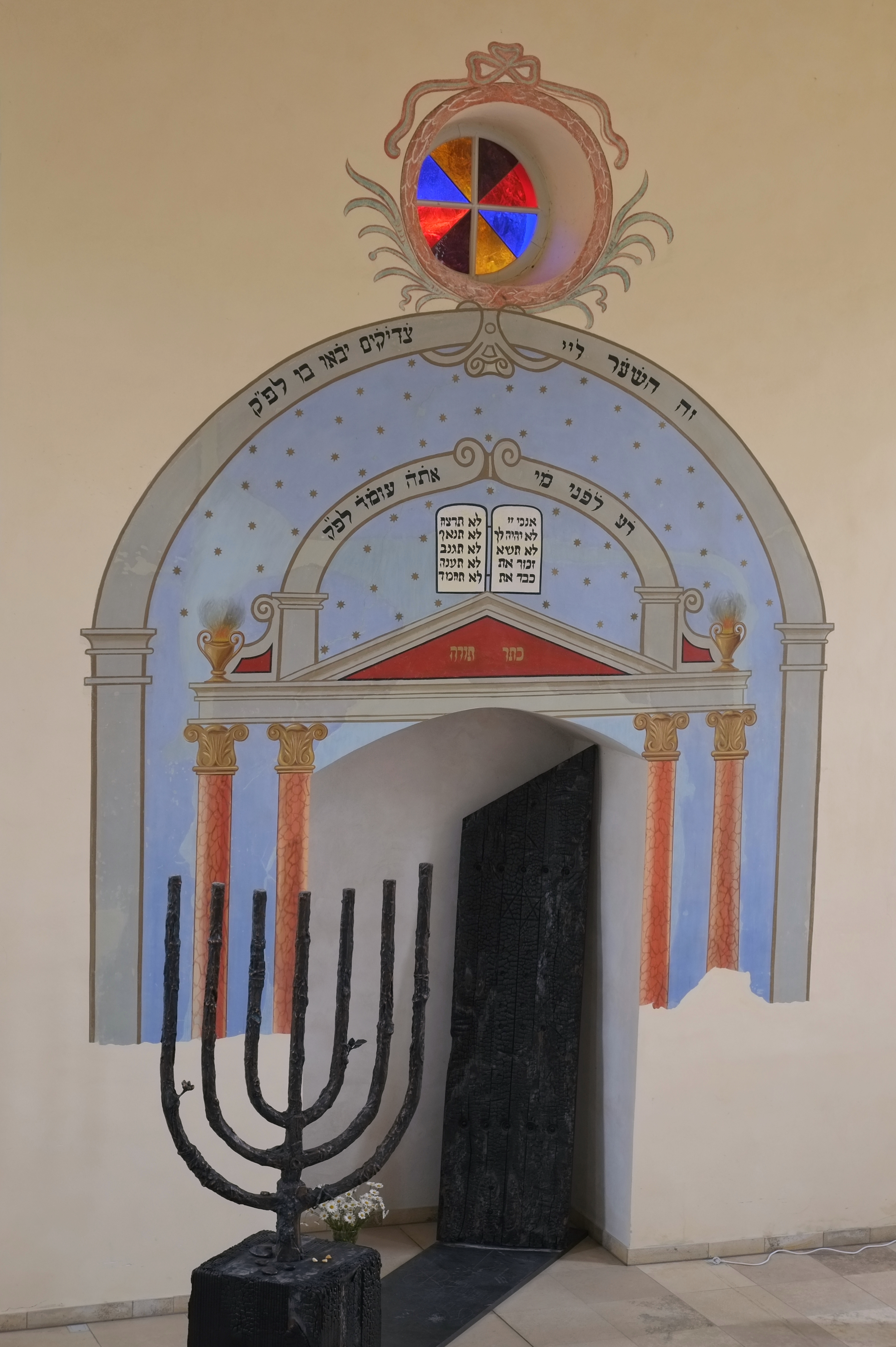 Synagoge in Oberdorf am Ipf im Ostalbkreis (Baden-Württemberg), Toraschrein